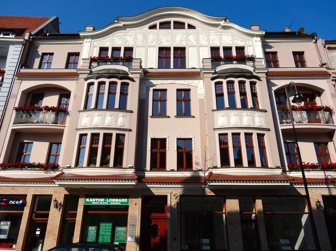 Kamienica przy ul. Dworcowej 47 w Bydgoszczy (1906, secesja)